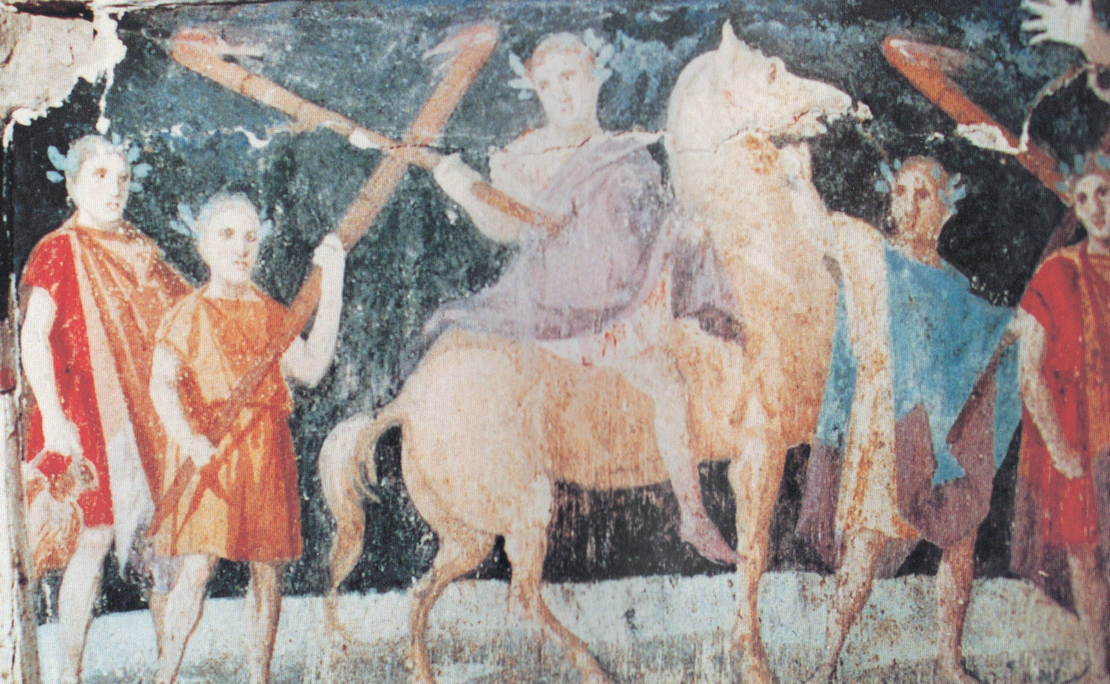 Παράσταση